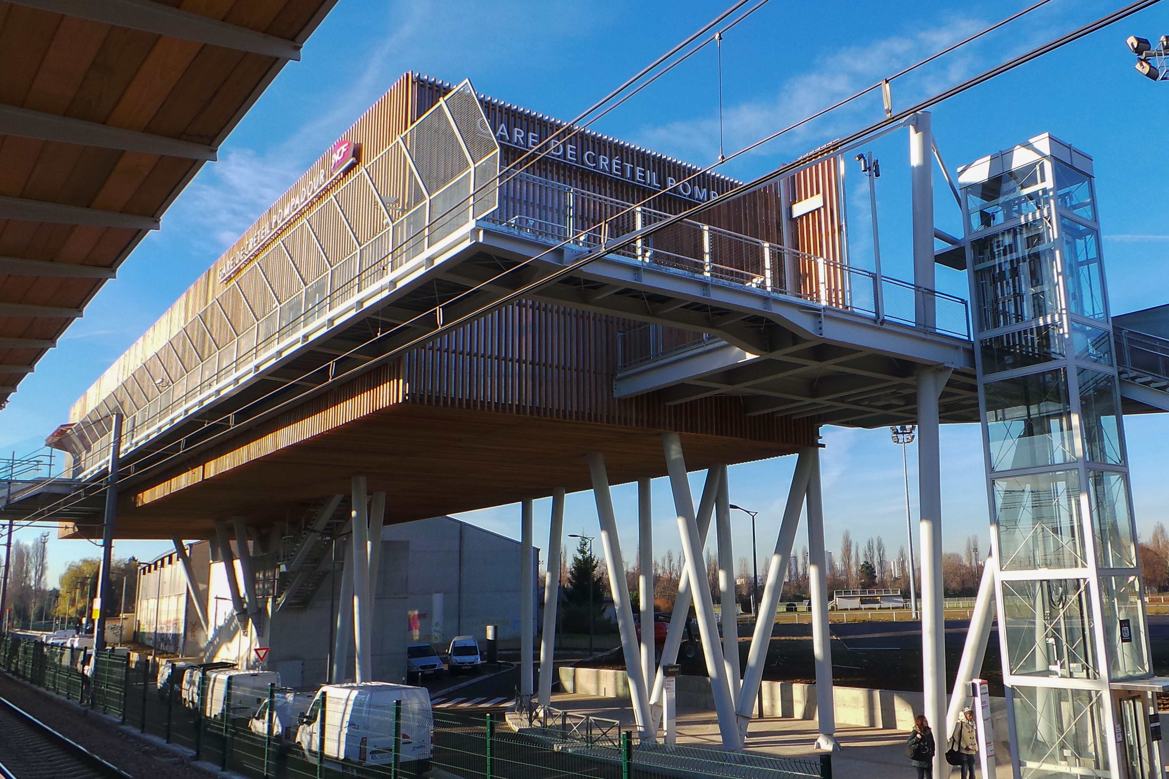 Gare de Créteil-Pompadour / RER D / Créteil, Val-de-Marme, France